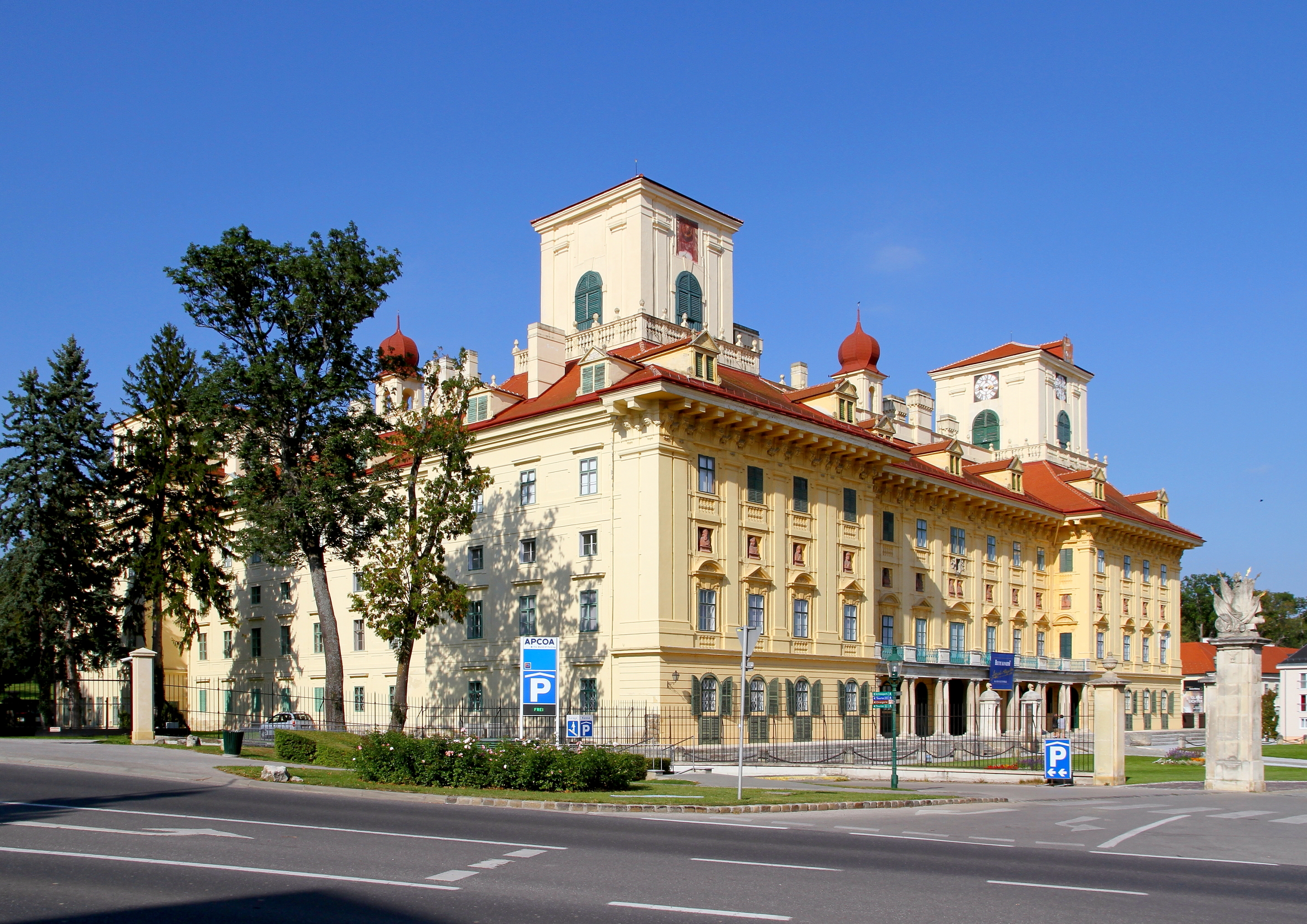 Das Schloss Esterhazy in der burgenländischen Stadt Eisenstadt.